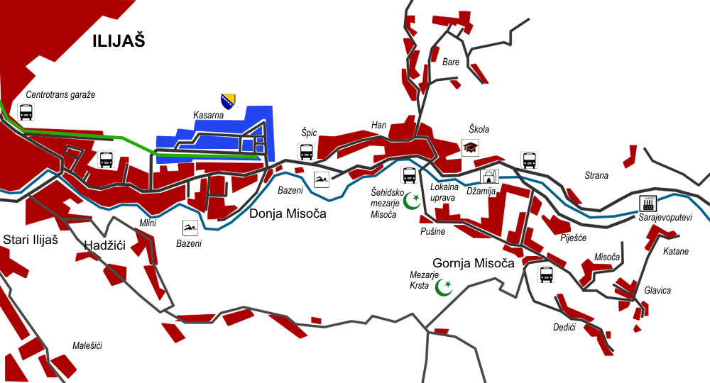 Mapa naselja Misoča